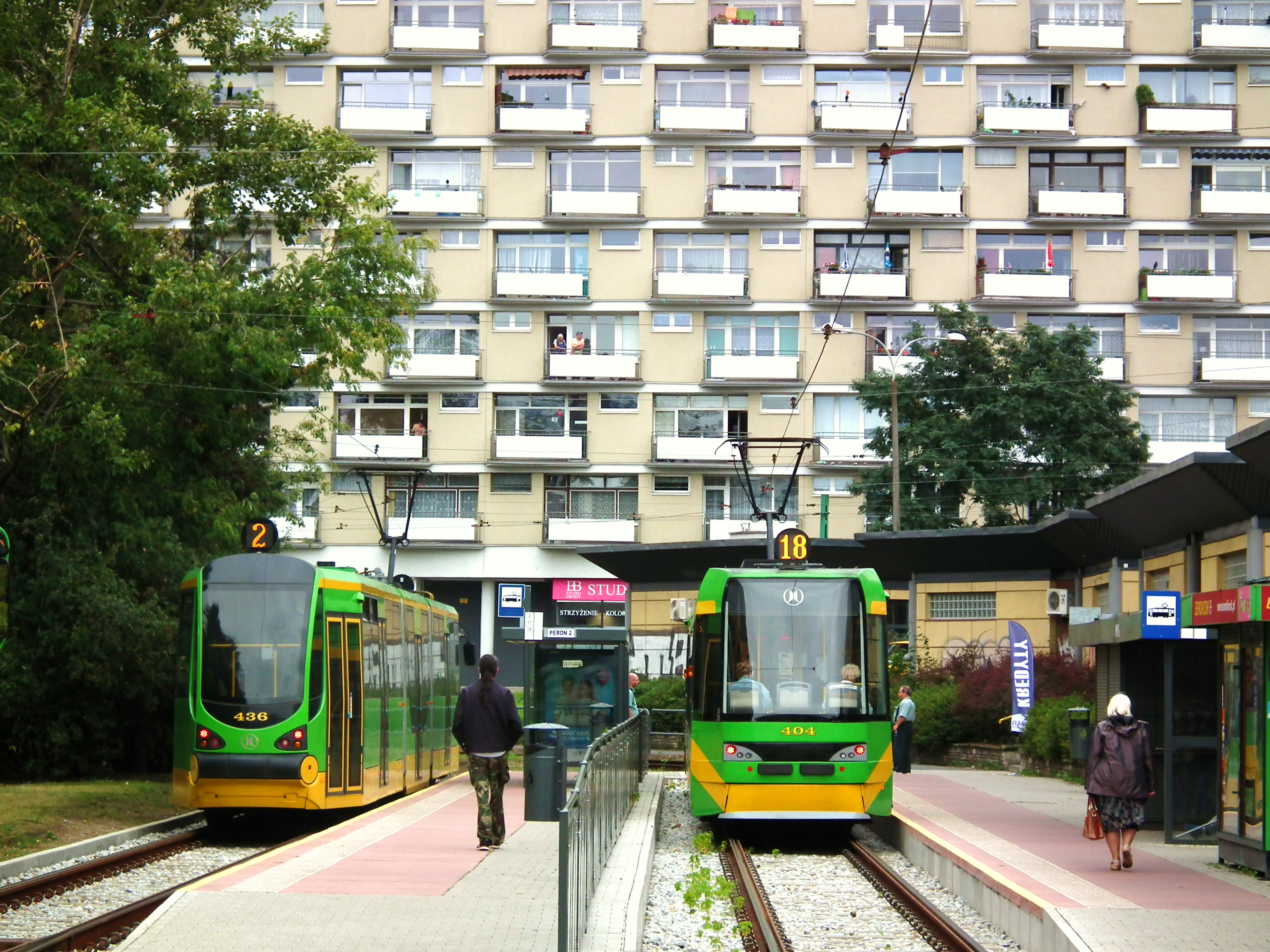 Tramwaje wracają na ulicę Dąbrowskiego i pętlę Ogrody w Poznaniu we wrześniu 2016r.